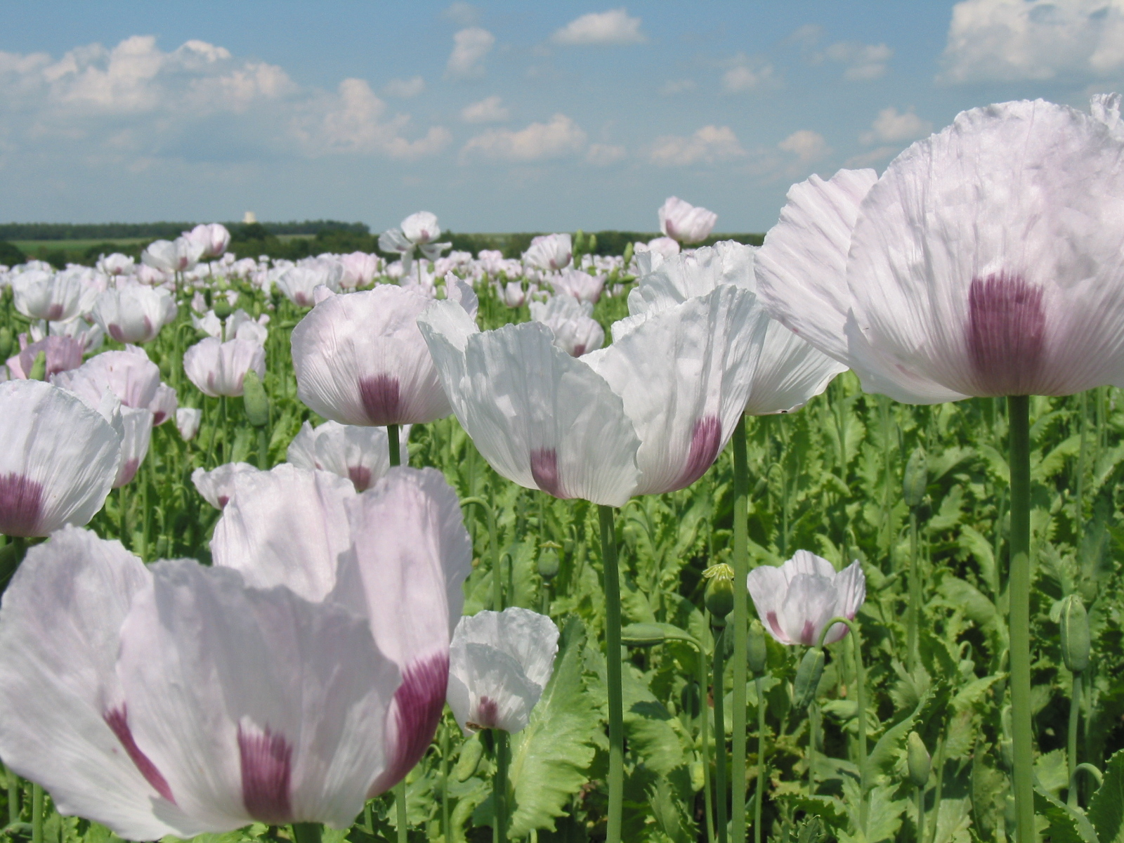 Schlafmohn (Papaver somniferum), Mohnblumenfeld in Frankreich